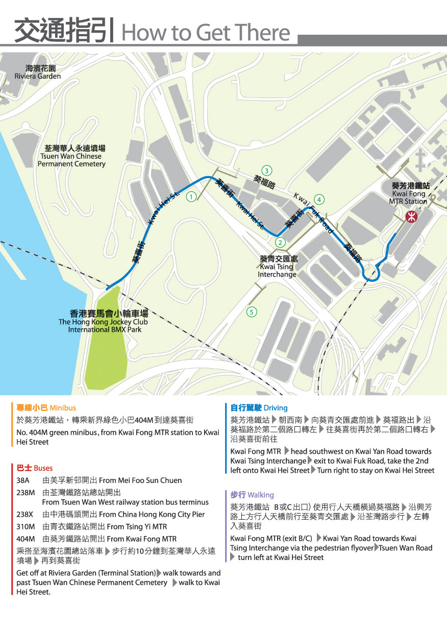 香港賽馬會國際小輪車場 - 交通指引